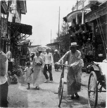 1930年代隆福寺街景。